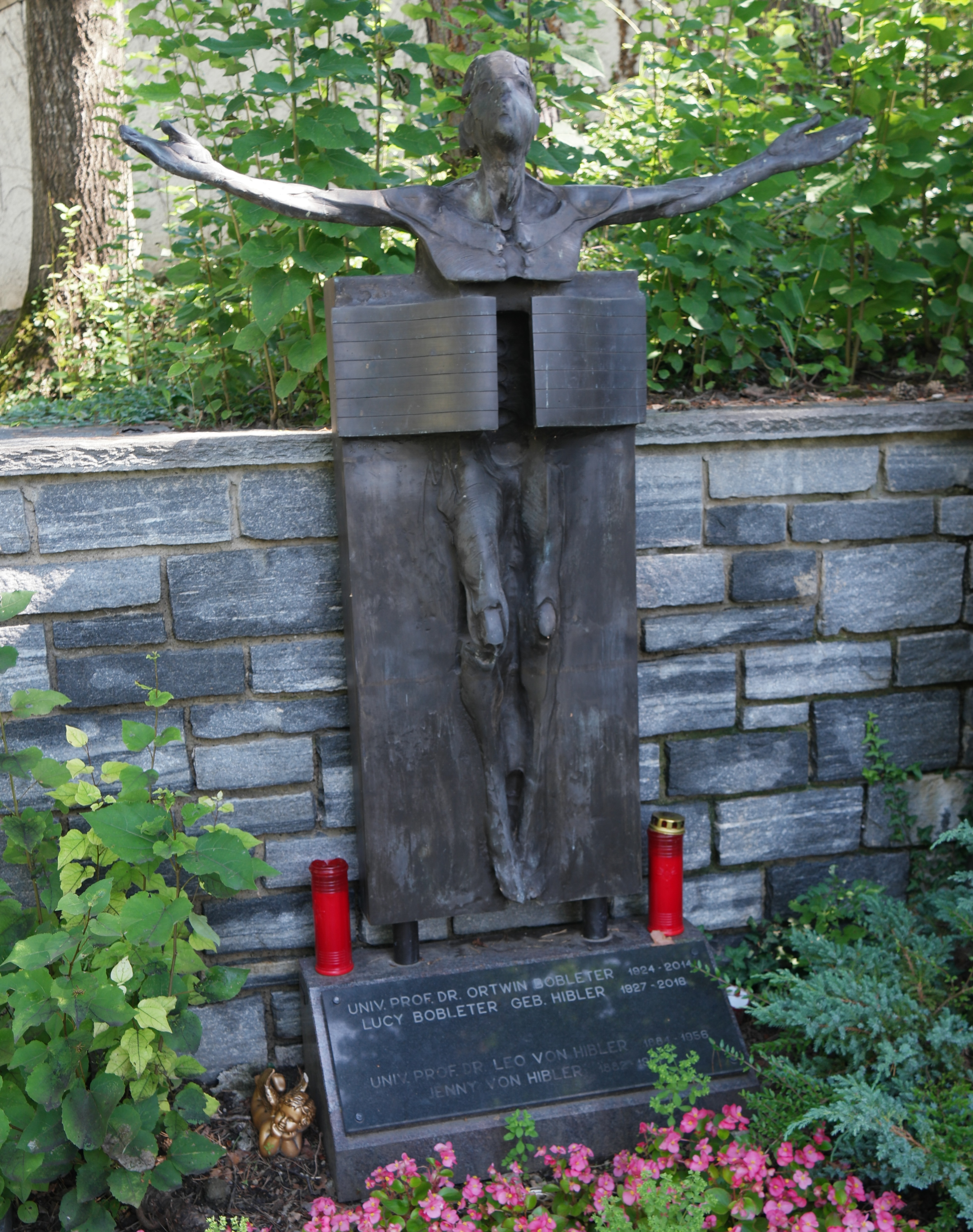 Grab des Anglisten Leo von Hibler (1884-1956) auf dem Neuen Friedhof Mühlau, Innsbruck